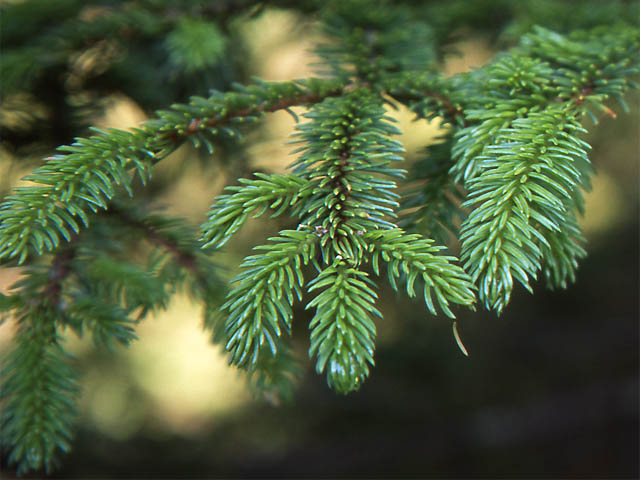 Hojas de Picea glehnii, en Kawayu Hokkaido, Japon. アカエゾマツの葉。2007年7月、北海道・川湯温泉で撮影